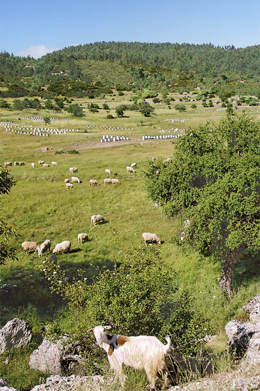 „Auch ich war in Arkadien" und zwar erstmals 1977 - 2 Tsd Jahre nach Vergil Arkadia: idyllic pastures, ever since